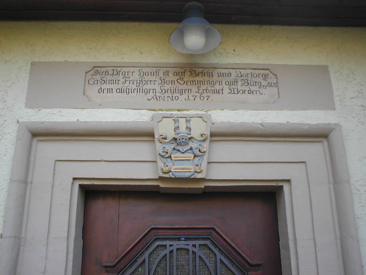 Gemmingensches Wappen am Pfarrhaus in Neuenstadt-Bürg, erbaut 1767 durch Casimir v. Gemmingen, Rathaus von 1906-82.